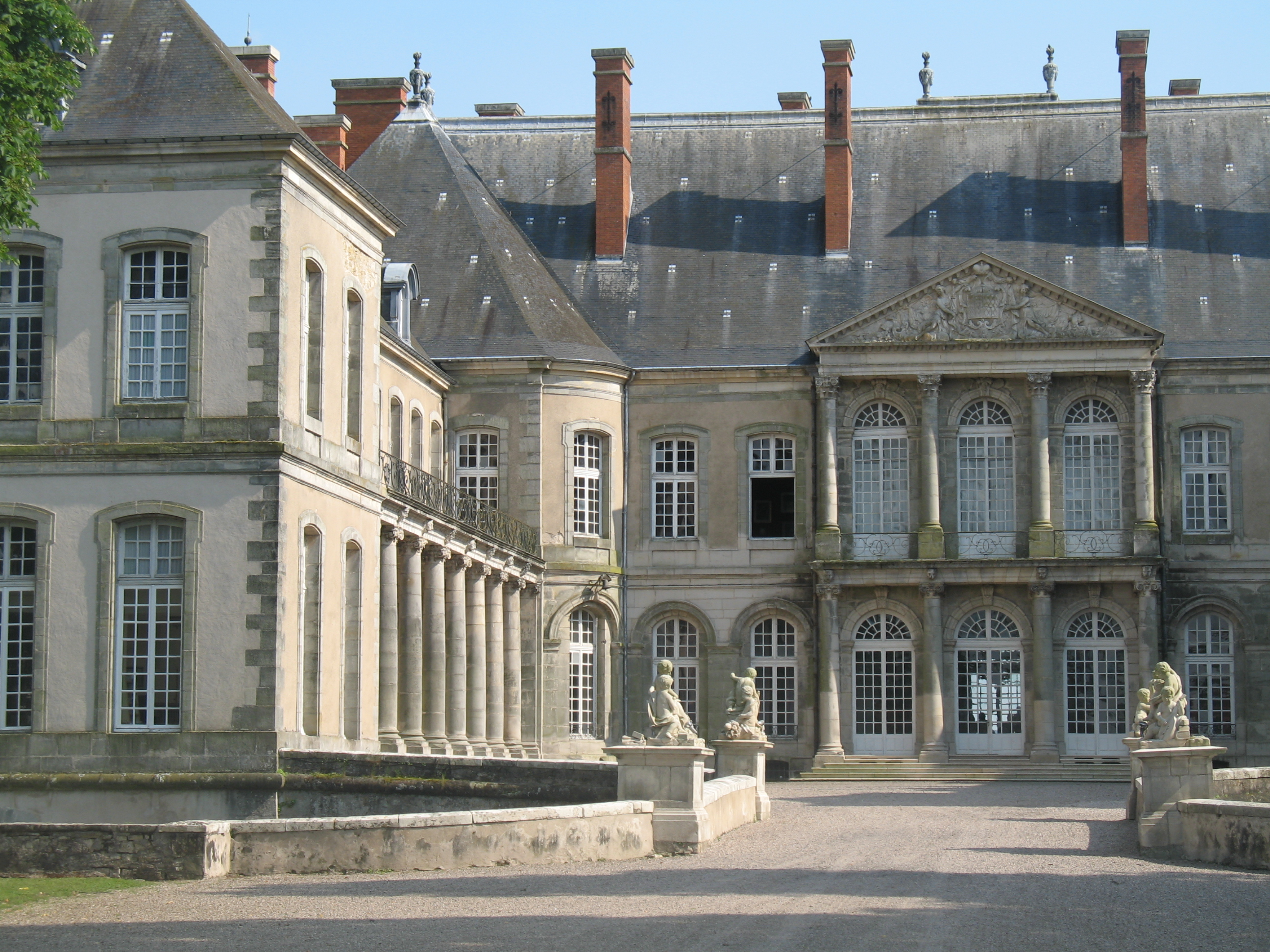 Château d'Haroué en Meurthe-et-Moselle. .